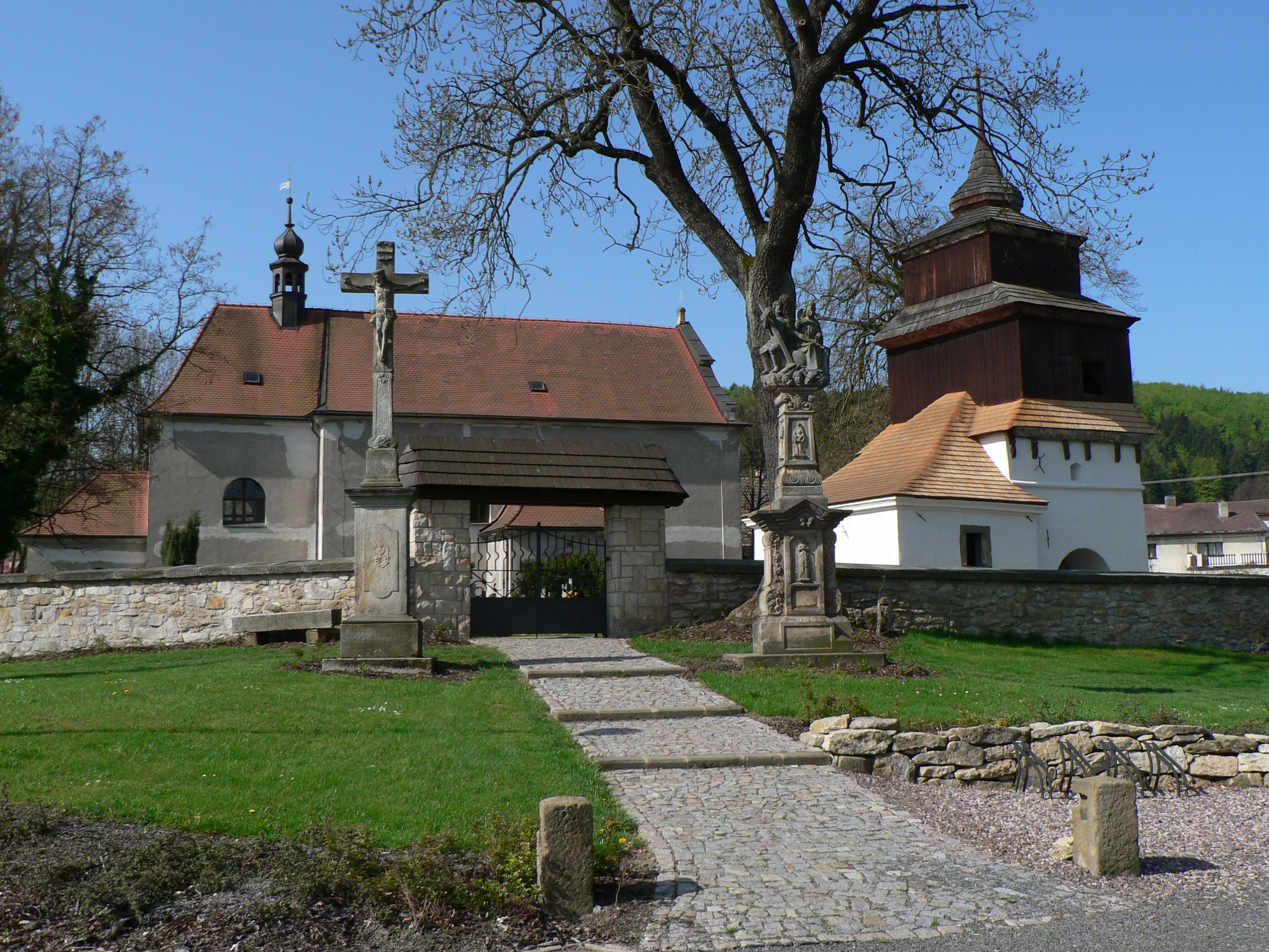 Semanín, kostel sv. Bartoloměje se zvonicí, křížem a Nejsvětější Trojicí